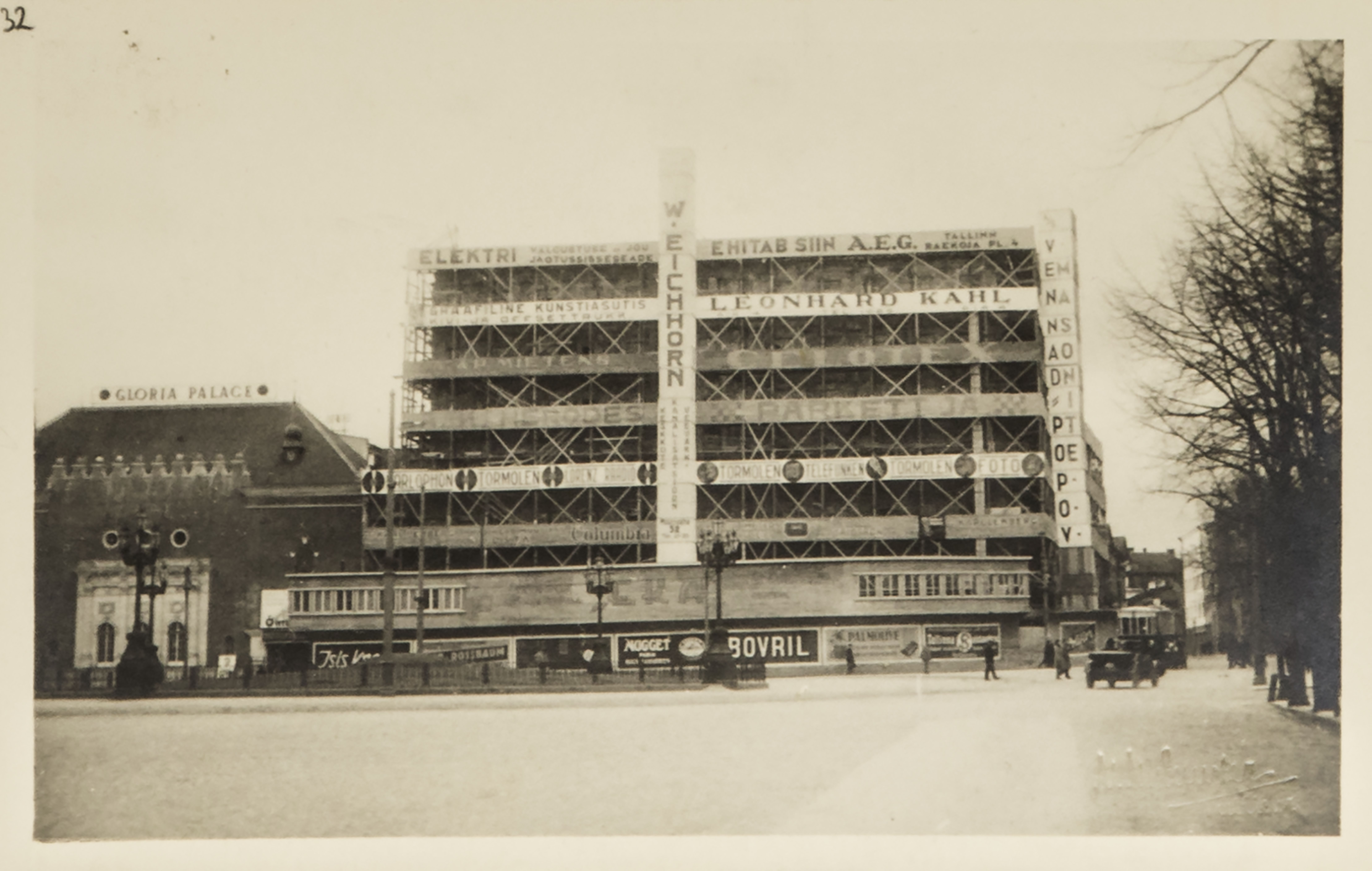 EKA maja ehitus